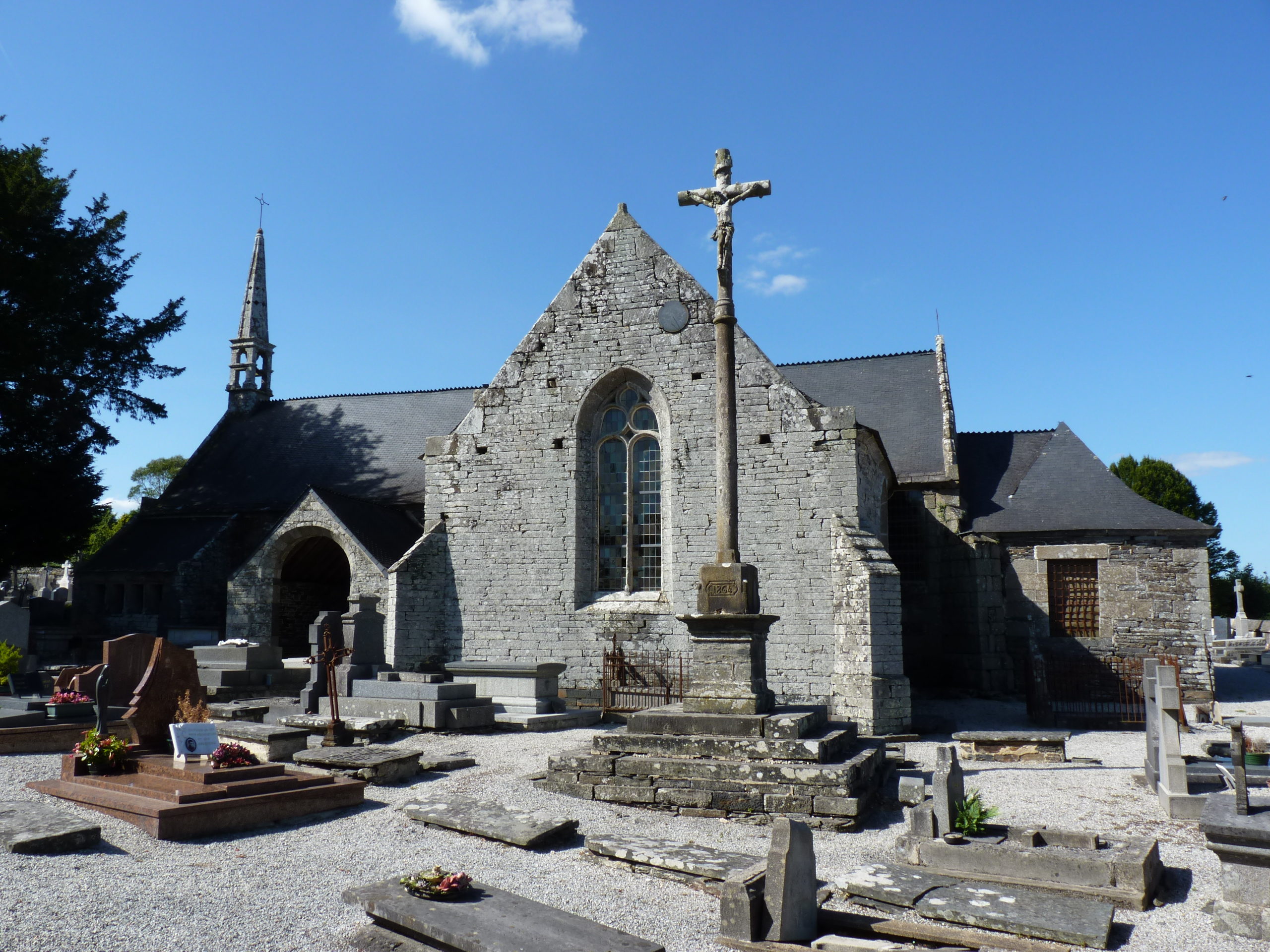 Ancienne église du 16ème siècle.